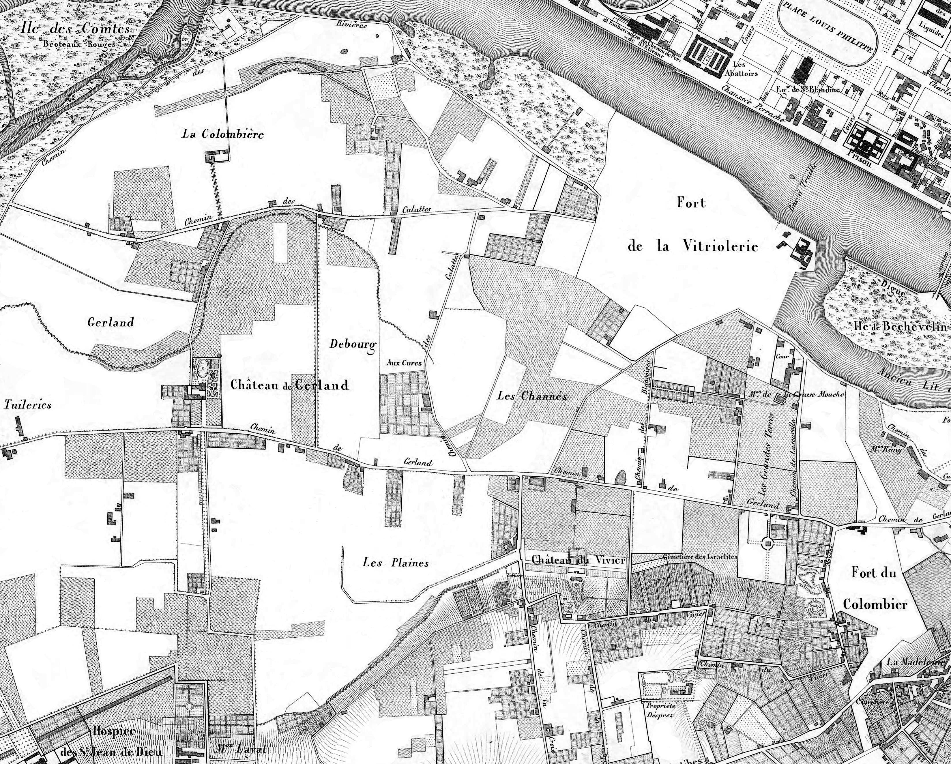 Plan topographique de la ville de Lyon et de ses environs / levé, dessiné et gravé par Eugène Rembielenski et Laurent de Dignoscyo, 1847. Détail centré sur le quartier de Gerland. Bibliothèque nationale de France